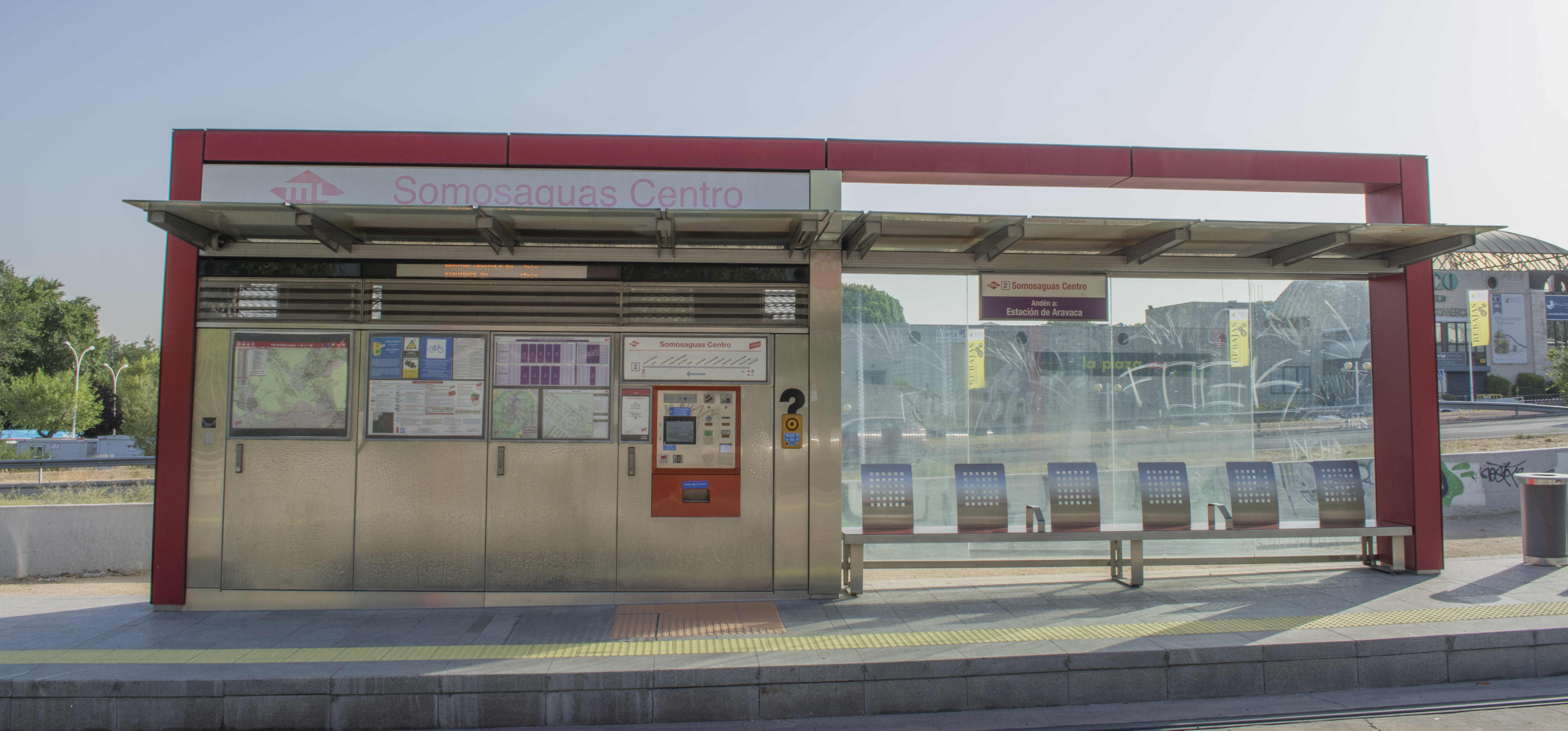 Andén de la estación Somosaguas Centro, de Metro Ligero Madrid, en dirección Estación de Aravaca.